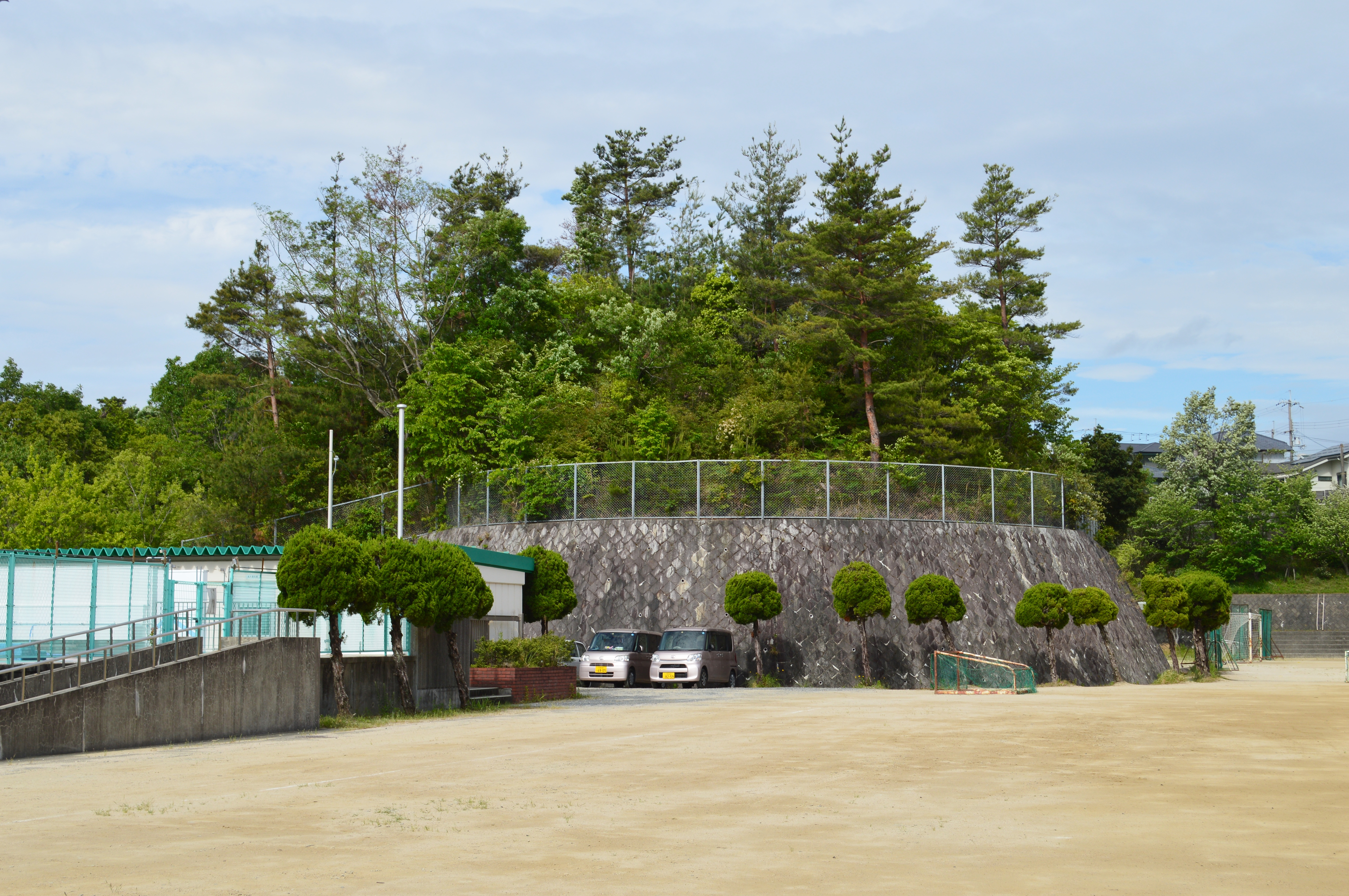 安威1号墳 墳丘遠景